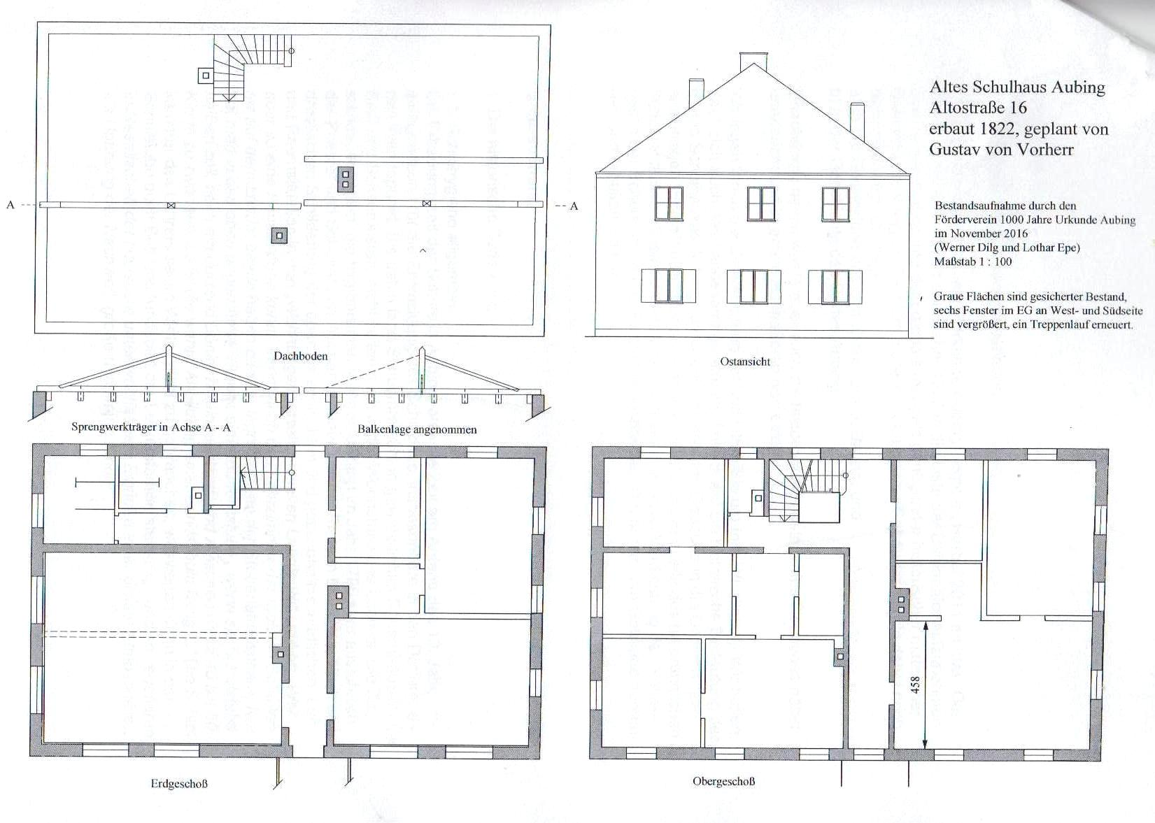 Schulhaus in München-Aubing, 1822 erbaut, Planskizze.